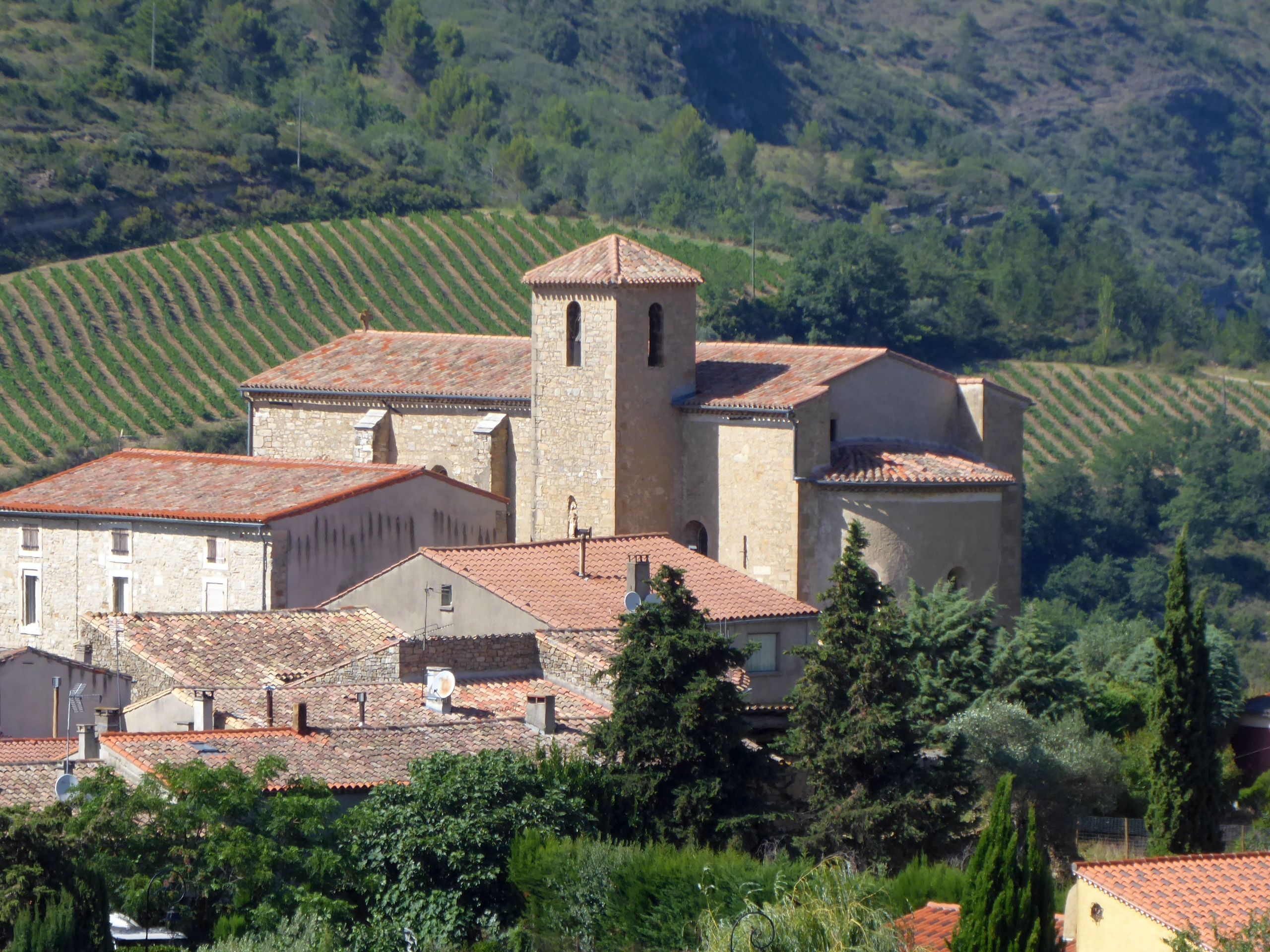 Église Saint-Étienne de Roquetaillade (Aude)